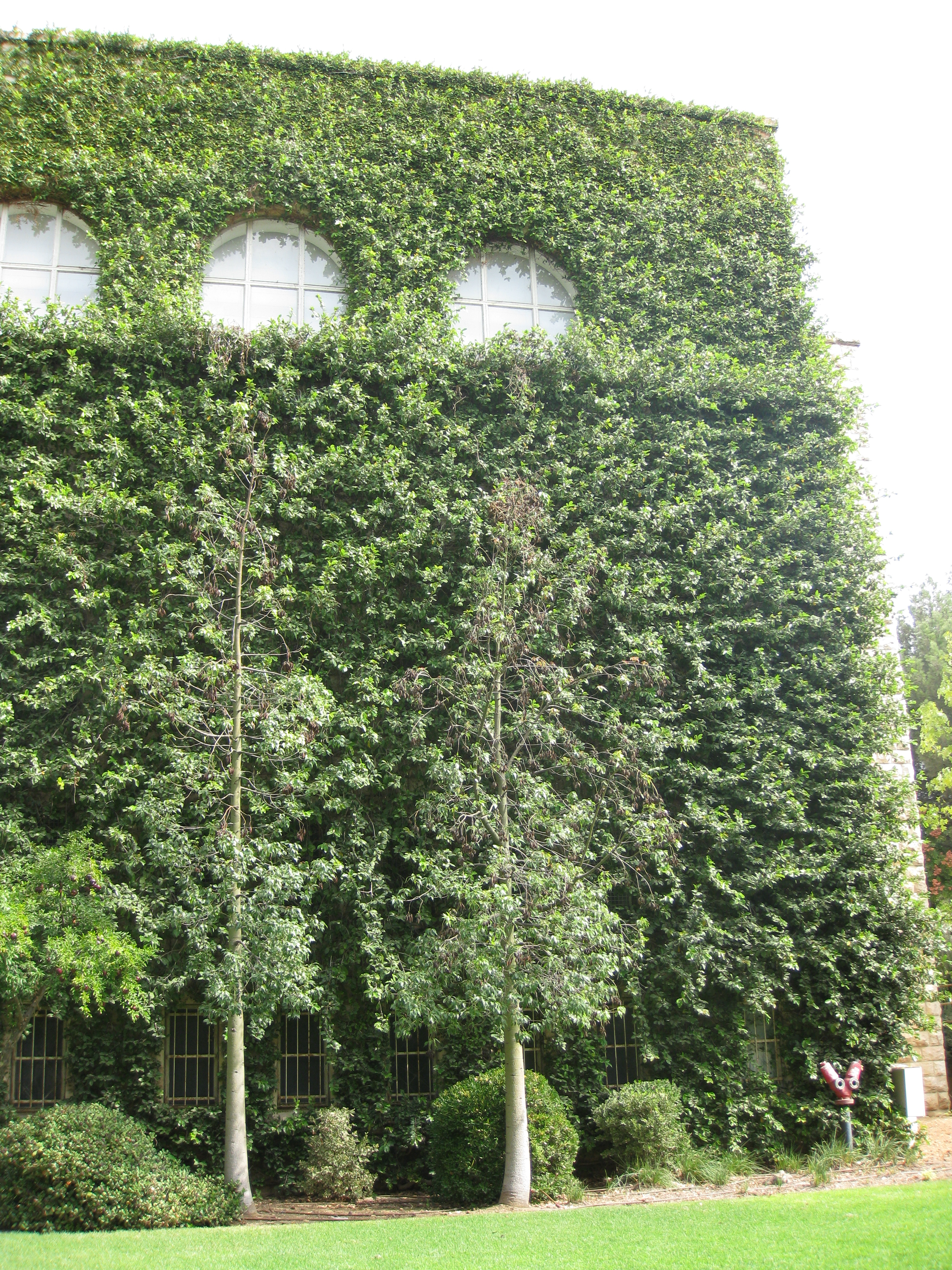 Mount Scopus הר הצופים